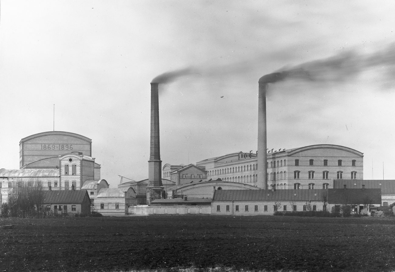 B17479. Arlöfs sockerfabrik. Fotografiet är skänkt till Tekniska museet från Svenska Turistföreningen.